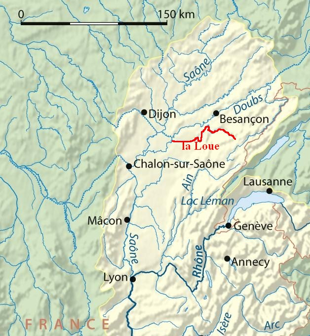 surlignage du tracé de la rivière Loue (affluent du Doubs, sous affluent de la Saône) - France